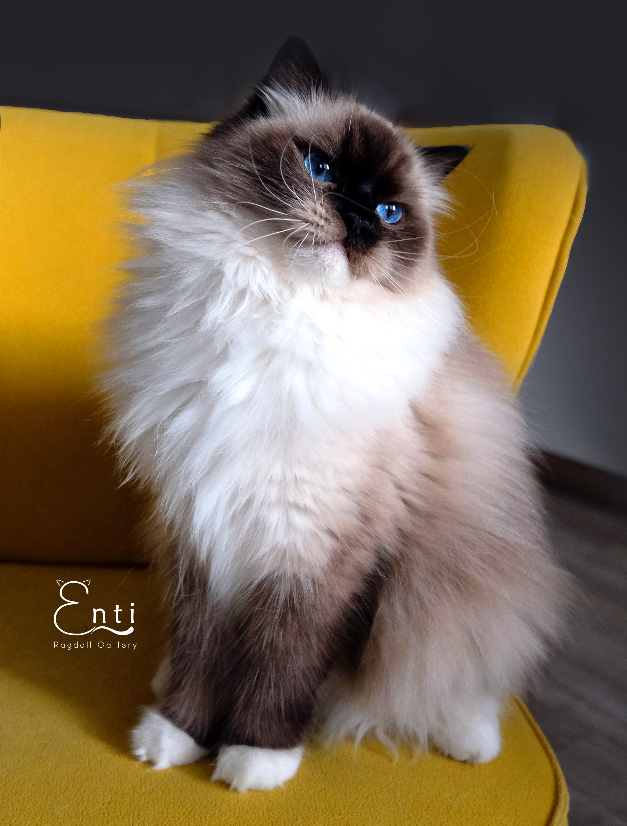 Alisma Enti*PL Ragdoll w kolorze seal i umaszczeniu mitted (z białymi skarpetkami)